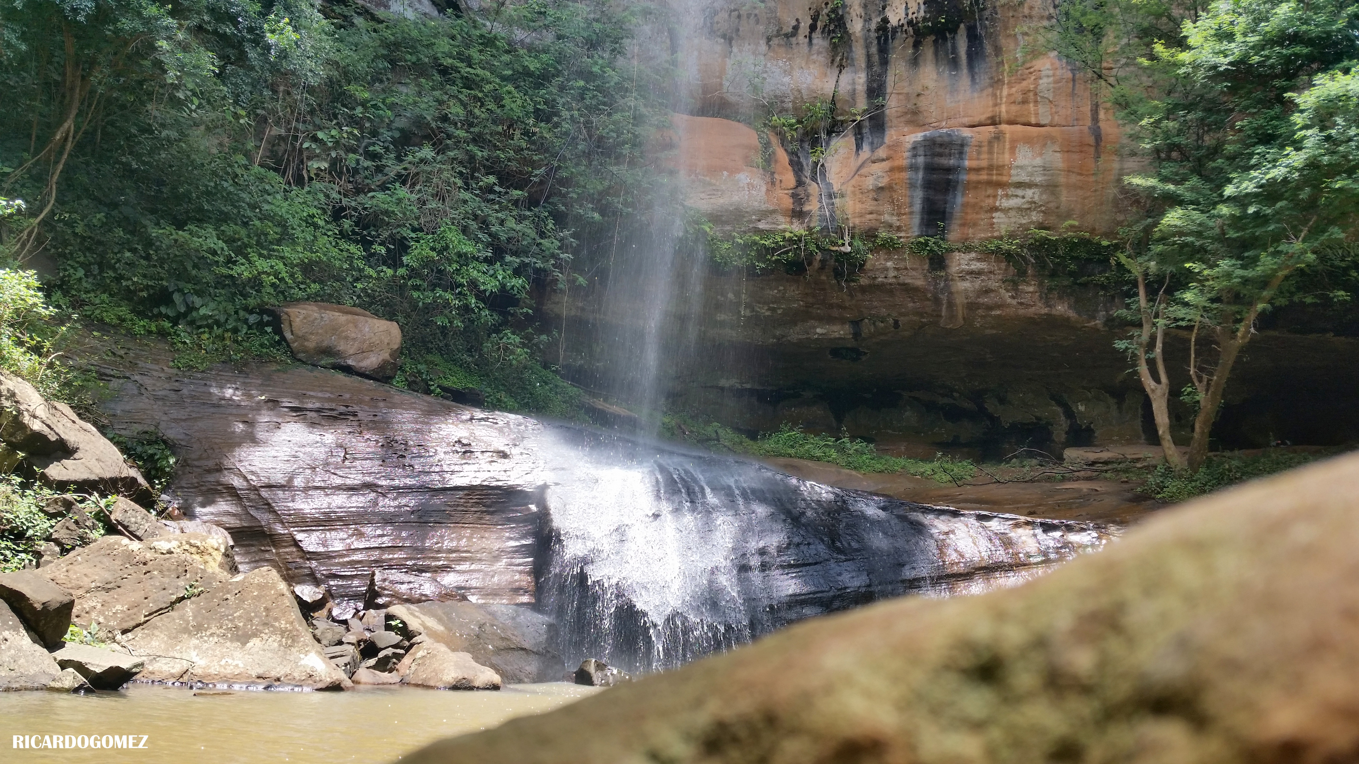 Salto Suizo una riqueza natural del paraguay